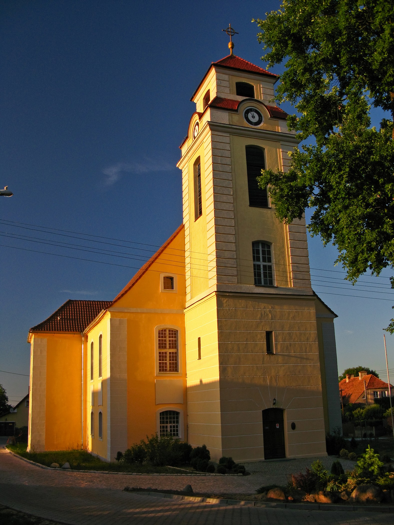 Przytok - kościół p.w. Wniebowzięcia NMP (klasycystyczny z XVIII wieku, zabytek nr rejestr. 523)